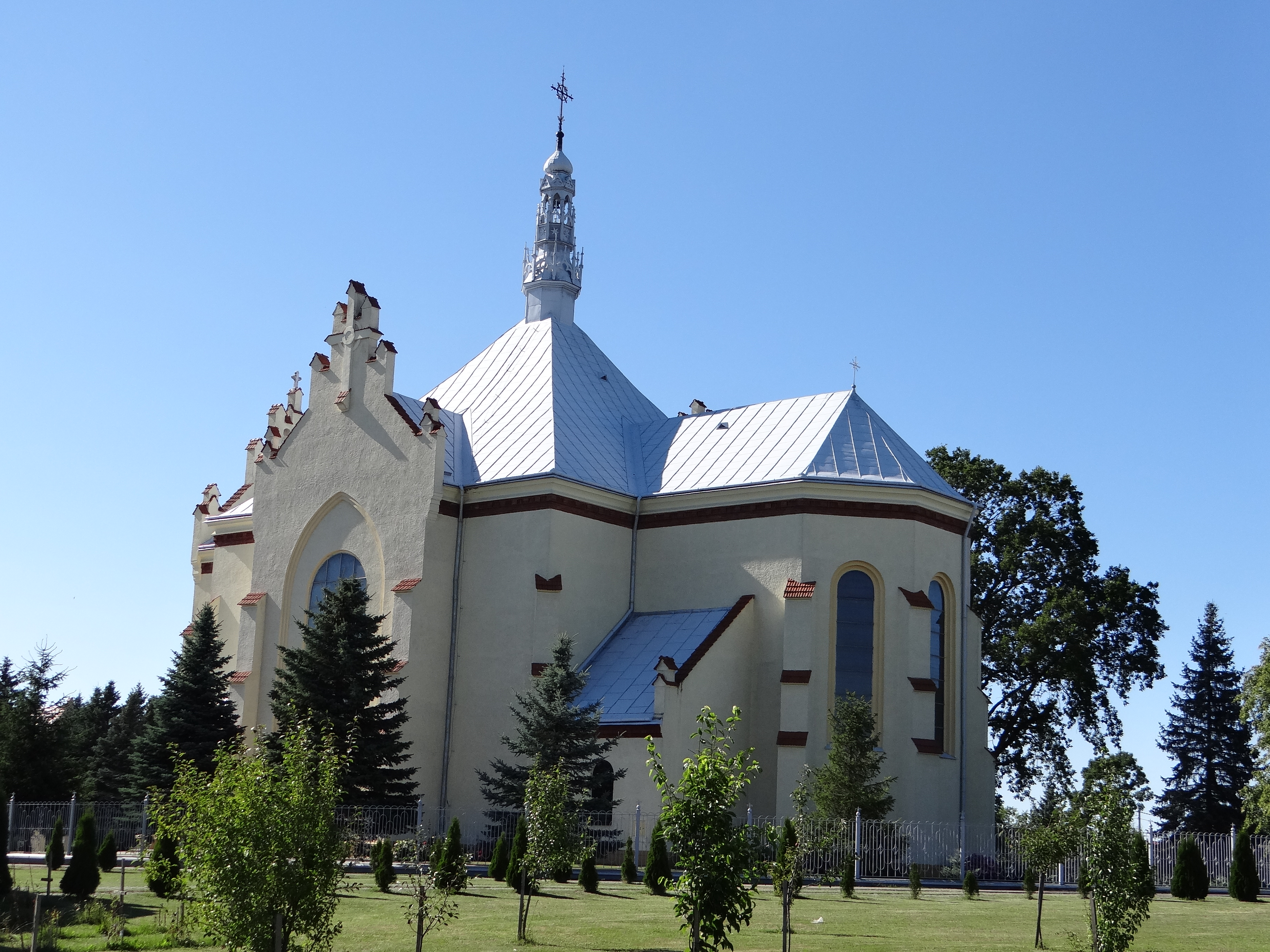 Kościół rzymskokatolicki pw. Najświętszego Serca Jezusowego w Kamieniu (województwo podkarpackie)